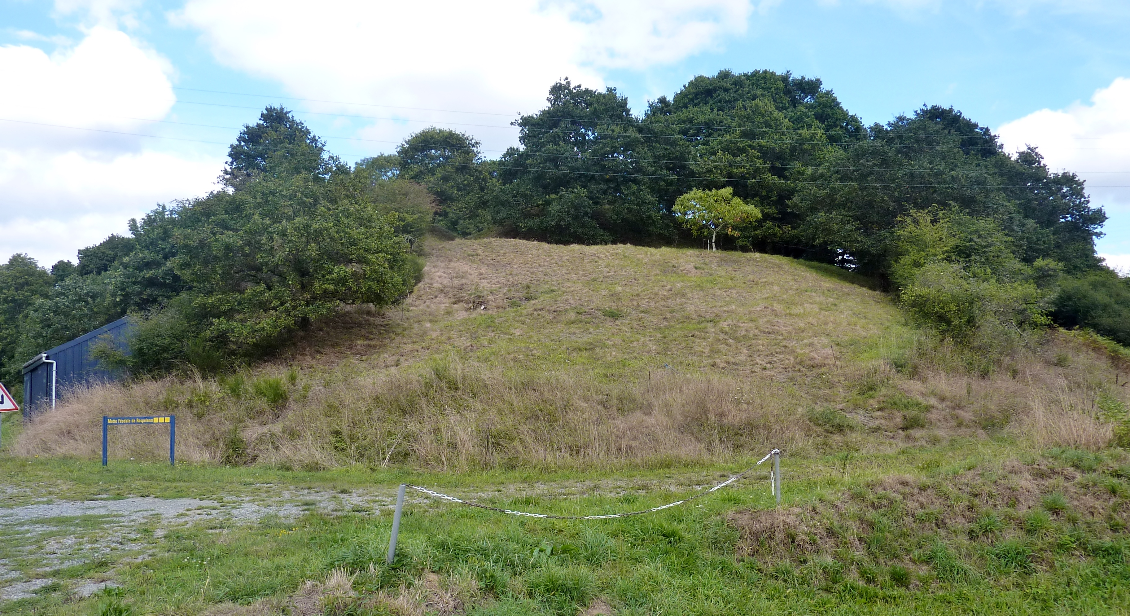 Carnoët : la motte féodale de Rospellem (Rospelemm).